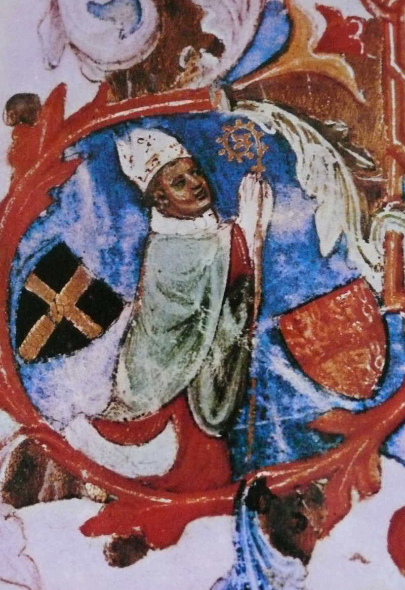 Jan IX. ze Středy